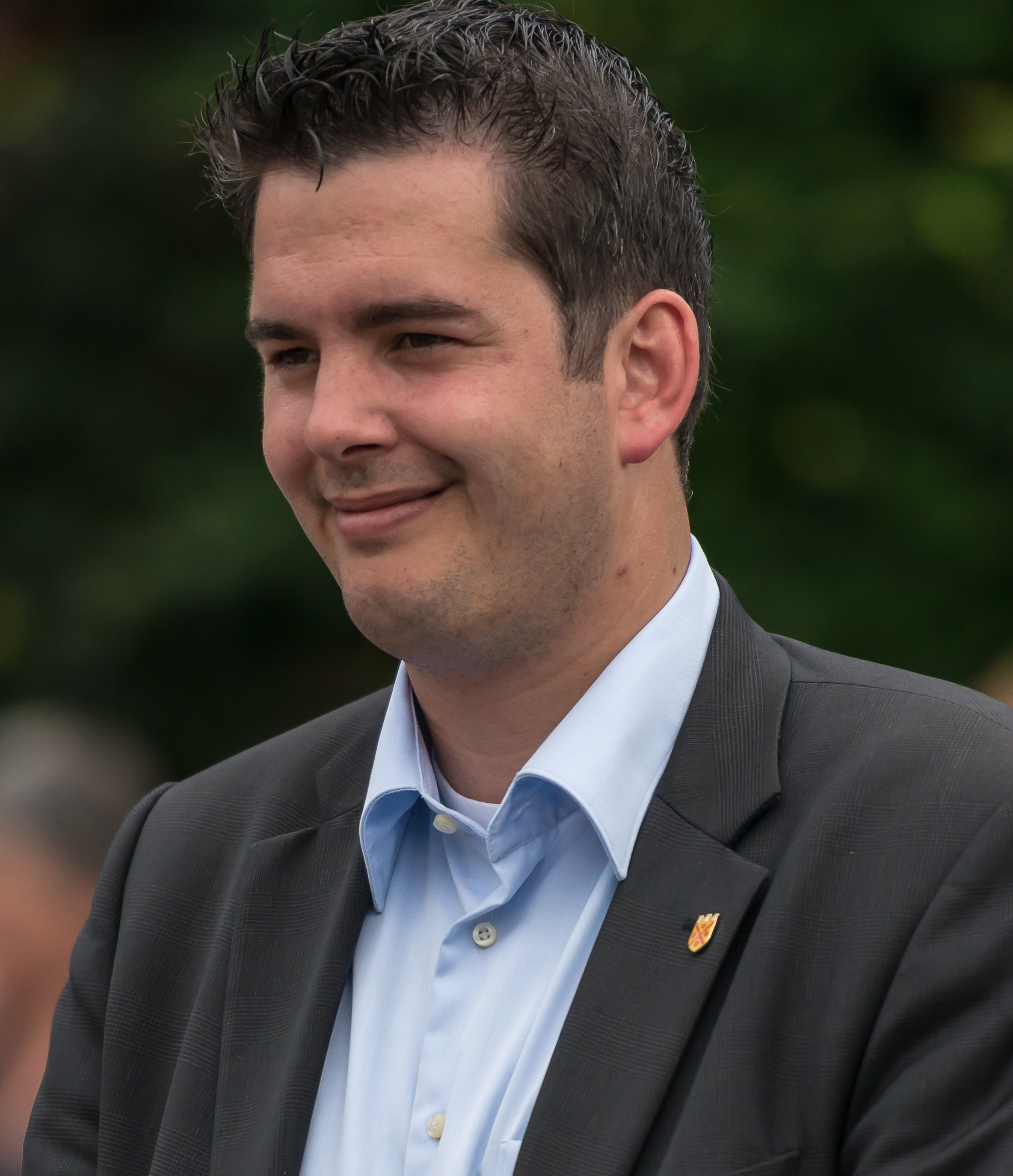 Vrum Krich hunn zu Réimech fënnef jüddesch Famille gewunnt. Dräizeng Mënsche vun hinne goufen ëmbruecht, nëmme fënnef hunn den Holocaust iwwerlieft - alleguerte ware si Affer deene bis dohi vun offizieller Säit net geduecht gouf. Dofir huet d'Stad Réimech als ofschléissend Aktioun am Kader vu "Mémoires communes - verfollegt, verdrängt, vergiess" de 24. Juni 2016 fir déi Doudeg siwwenzéng Stolpersteng vum däitsche Kënschtler Gunter Demnig verleeë gelooss. D'Stad Réimech, de Buergermeeschter Henri Kox, d'Membere vum Schäffen- a Gemengerot an aacht Lokalassociatiounen hunn de Parrainage vun dëse Steng iwwerholl. Den nämmlechten Dag huet d'Gemeng an Zesummenaarbecht mat der asbl MemoShoah Lëtzebuerg eng Plaz fir d'Affer vun der Shoah ageweit. Domat ass Réimech déi éischt Uertschaft am Land déi sou ausdrécklech hir fréier jüddesch Awunner éiert. D'Verleeung vun de Stolpersteng huet beim Haus op Nr 54 an der Rue de Macher ugefaang. De Munnerefer Buergermeeschter huet der Zeremonie bäigewunnt. D'Famill Deichmann-Aron huet vun 1934 bis 1938 op där Plaz gewunnt. 1938 huet d'Koppel sech getrennt an den Kurt Deichmann (1907 zu Algrange gebuer) ass no Brasilien ausgewandert. D'Alice Deichmann-Aron (1903 zu Nürnberg gebuer) ass nom preiseschen Iwwerfall op Lëtzebuerg mat hirer Duechter Marion a Frankräich geflücht. Si gouf do verhaft an am Camp vun Drancy internéiert, vu wou si 1942 op Auschwitz deportéiert an do ëmbruecht gouf. D'Marion Deichmann huet de Krich iwwerlieft an hir Liewensgeschicht ënner dem Titel Je voudrais que son nom apparaisse partout verëffentlecht.